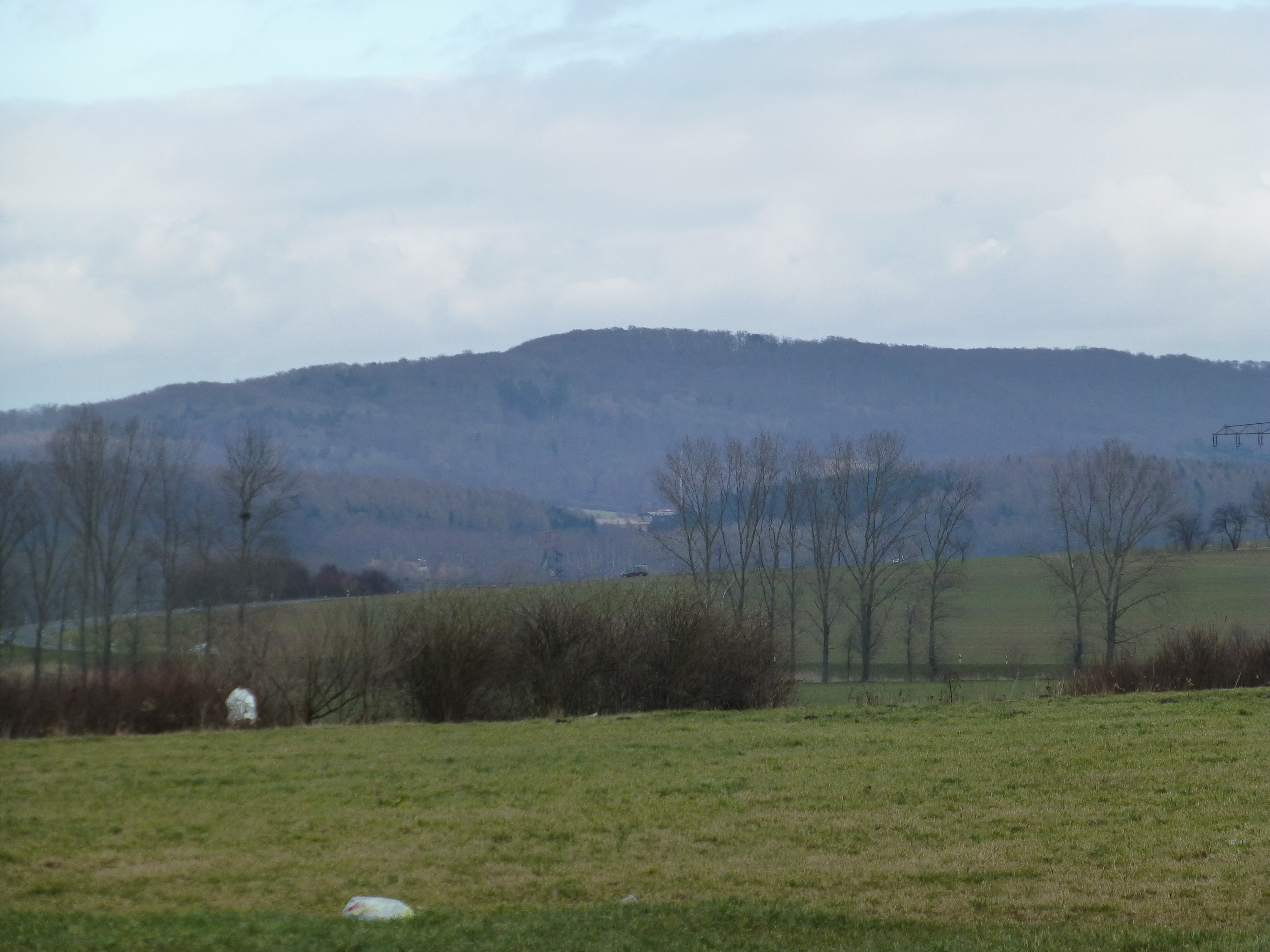 Der Ziegenrück in den Bleicheröder Bergen